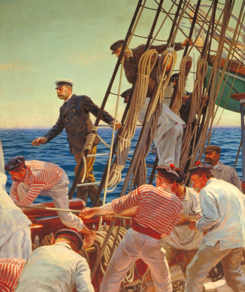 détail de la fresque de Louis Tinayre aidé d'Alexandre Brun décorant le grand amphithéâtre « le Pont de la Princesse Alice », Albert 1er de Monaco agrippé aux haubans du navire.